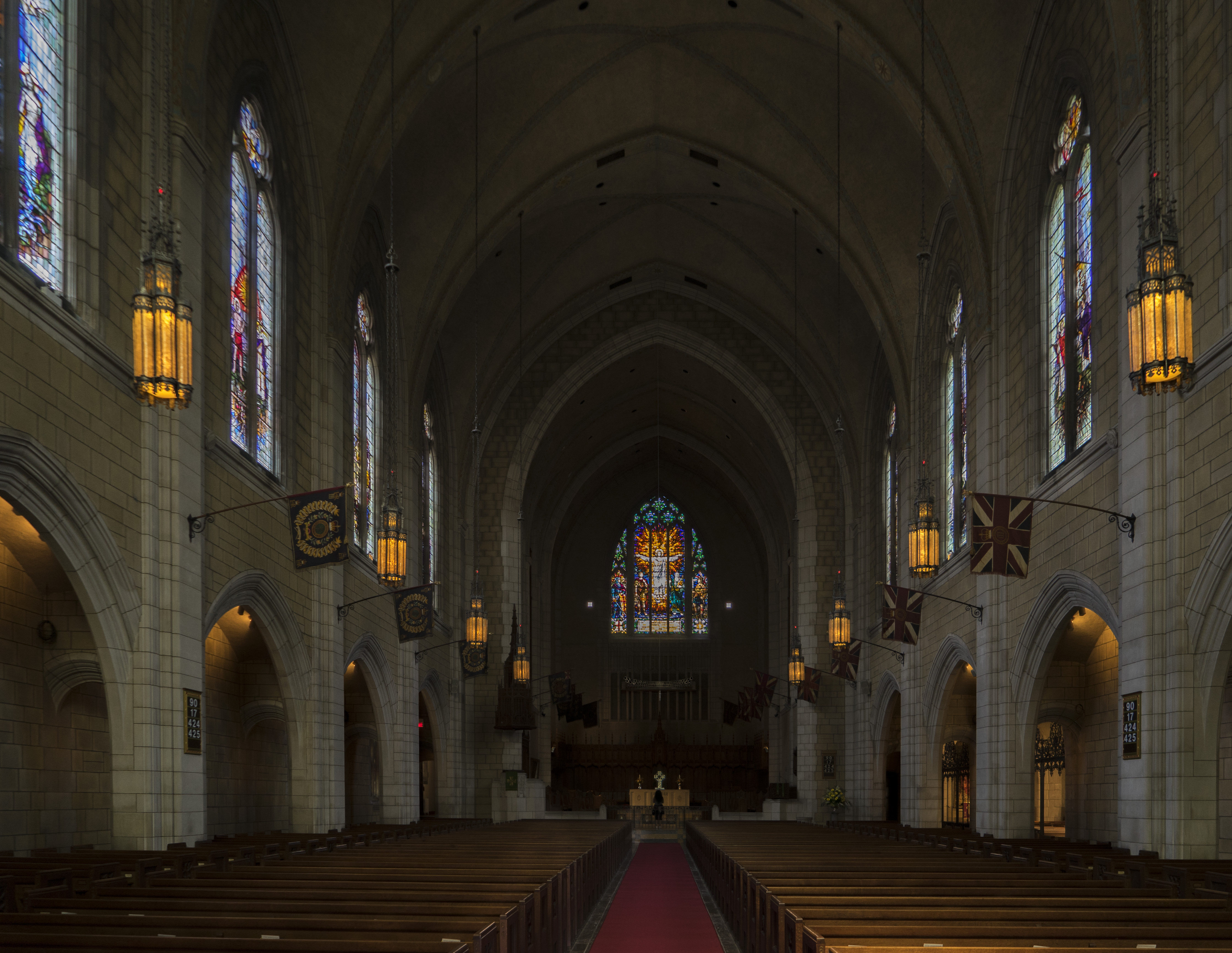 Church of St Andrew and St Paul, Montreal 1